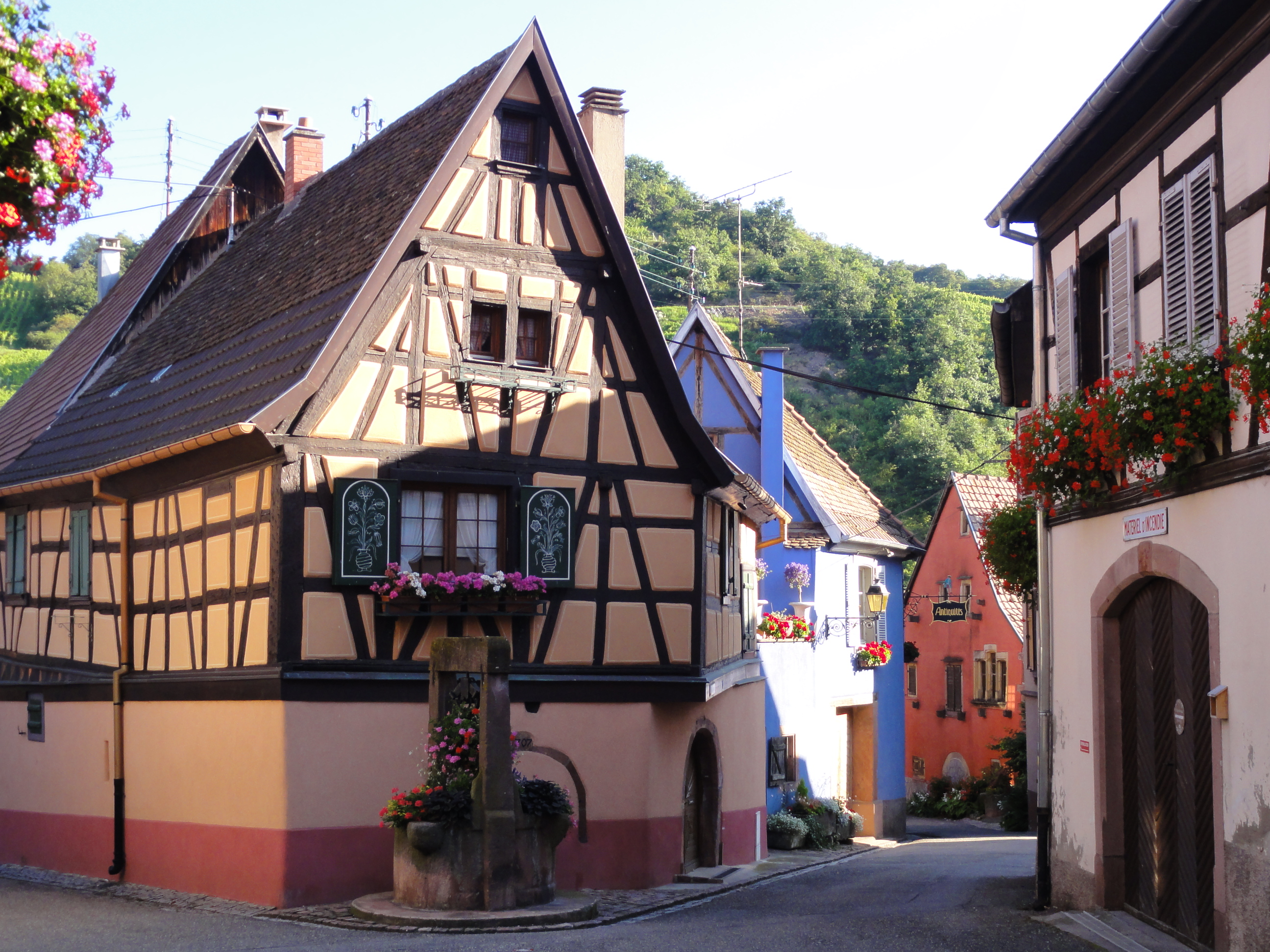 Alsace, Haut-Rhin, Niedermorschwihr, Maison de vigneron (XVIe-XVIIIe), 110 rue de Ribeaupierre. .